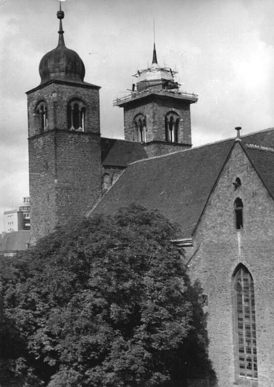 1952 Kirchen werden restauriert UBz, Bei dem großen anglo-amerikanischen Bombenangriff auf Magdeburg am 16.1.1945 wurden beide Türme der katholischen Sebastianskirche zerstört. Die Mittel zum Wiederaufbau stellte die Regierung der Deutschen Demokratischen Republik zur Verfügung und die Arbeitsgemeinschaft der Dessauer Dachdeckermeister. August Dehne und Karl Strien ist zurzeit damit beschäftigt, den einen der Zwiebeltürme mit Schiefer zu bekleiden. Information added by Wikimedia users.Magdeburg, old town, renovation of the towers, damaged in an Allied air raid on 16 January 1945, of the Catholic St. Sebastian Church (since 1994 Cathedral), photo: 1952